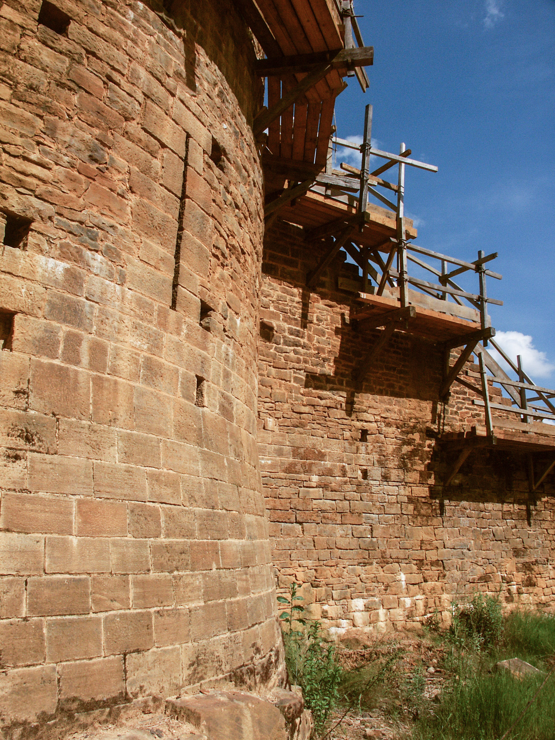 Échafaudages à la tour principale de Guédelon.